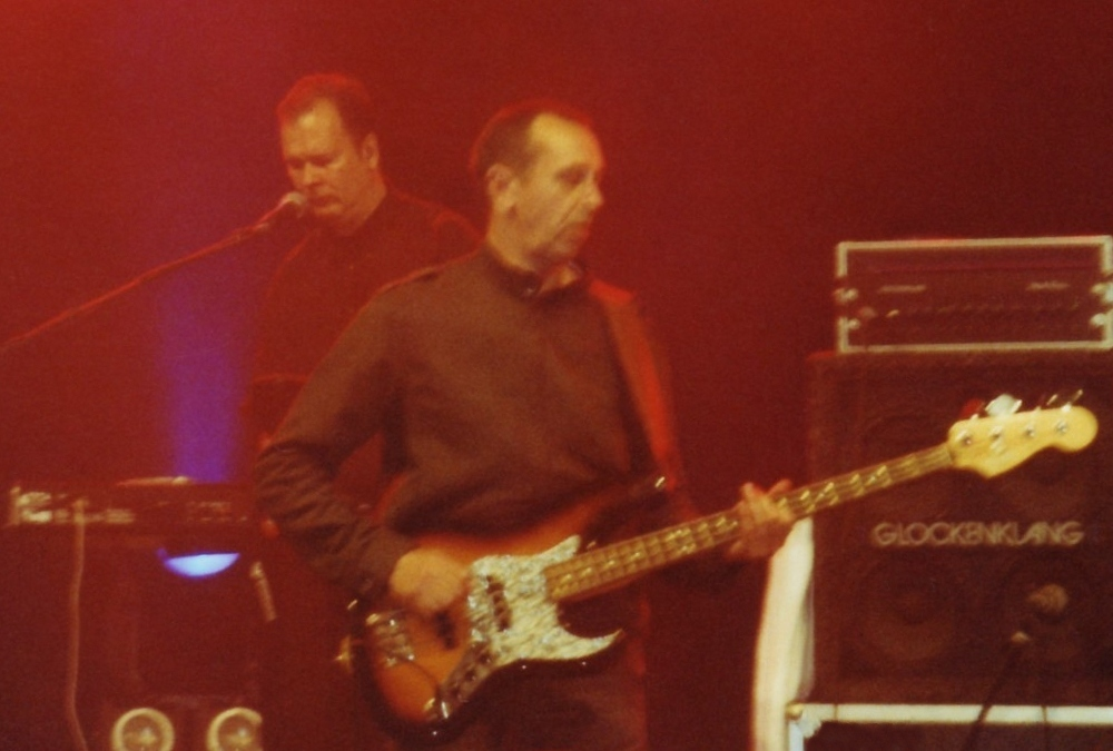 Die Band Fehlfarben beim Open-Air-Konzert „Seegeflüster“ in Hagen – Keyboarder Pyrolator (links) und Bassist Michael Kemner (rechts).